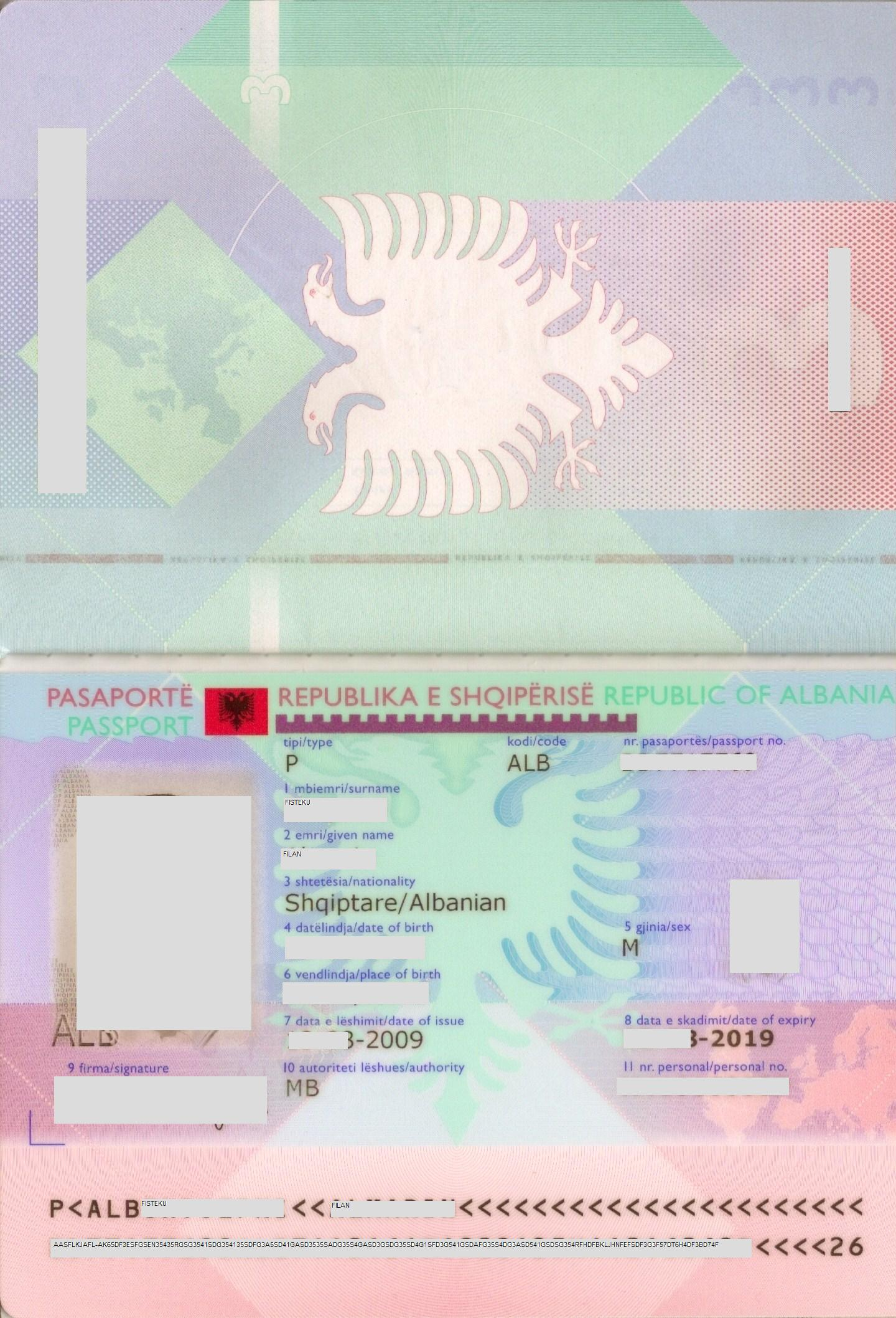 Pasaporta shqiptare 2009. Faqja e te dhenave, plastike, e forte dhe e paperkulshme.